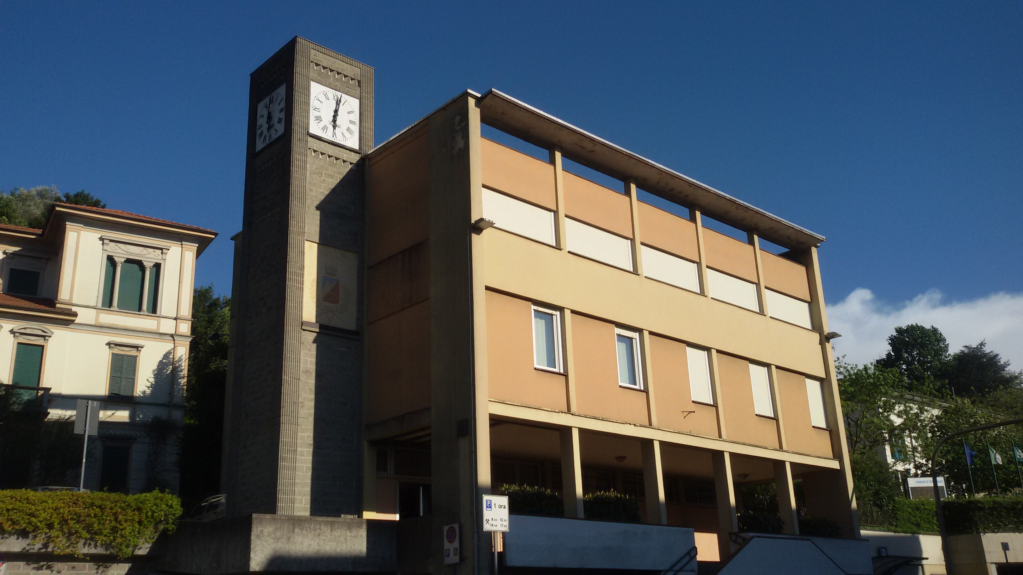 Municipio di Vercurago con Villa Borgomanero sulla sinistra